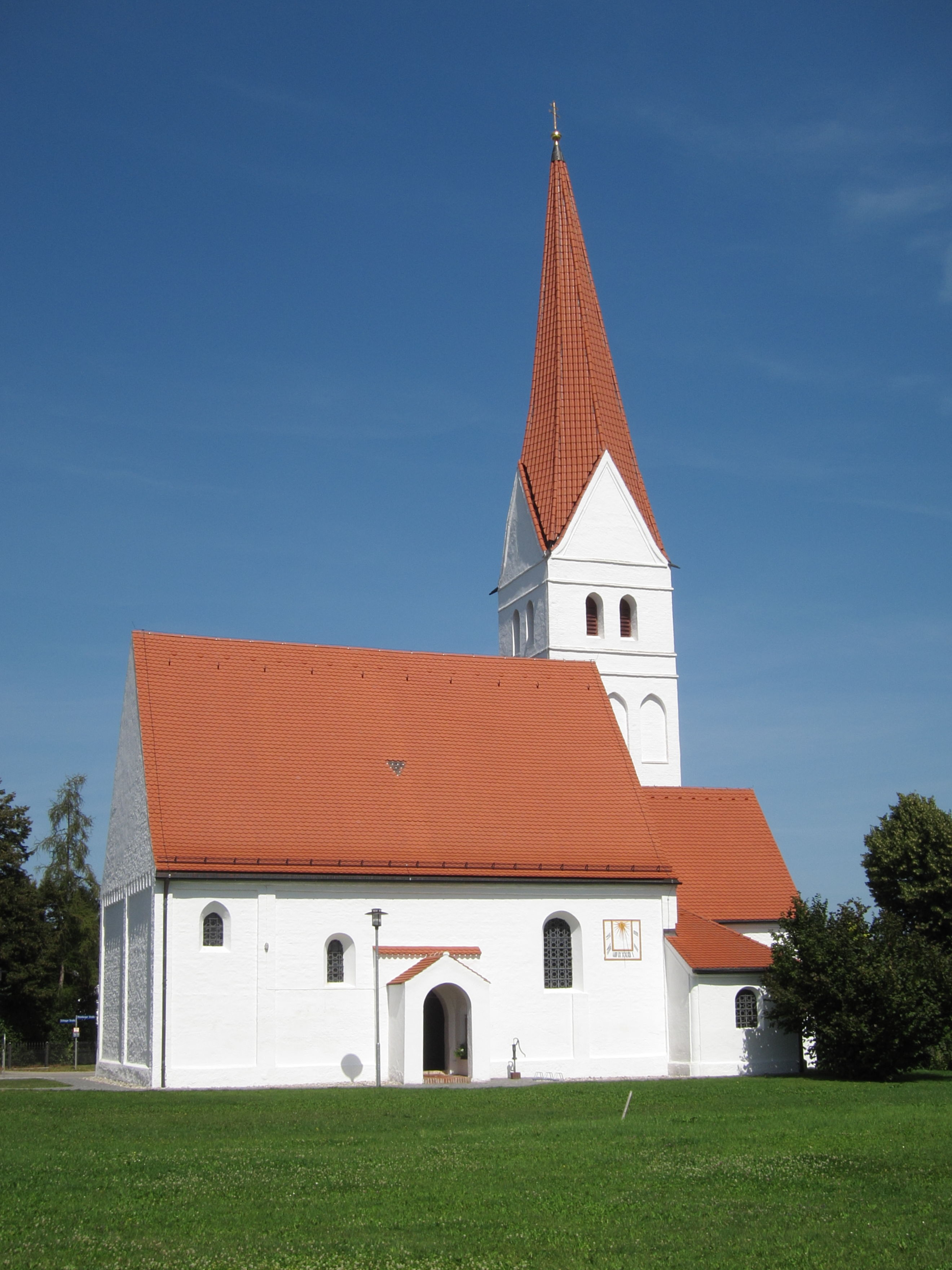 Gaden, kath. Filialkirche St. Jakobus d. Ä., spätgotischer Saalbau mit eingezogenem quadratischem Chor, erbaut 1431, Turm Ende 15. Jh.; mit Ausstattung.